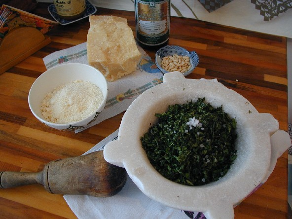 Pesto